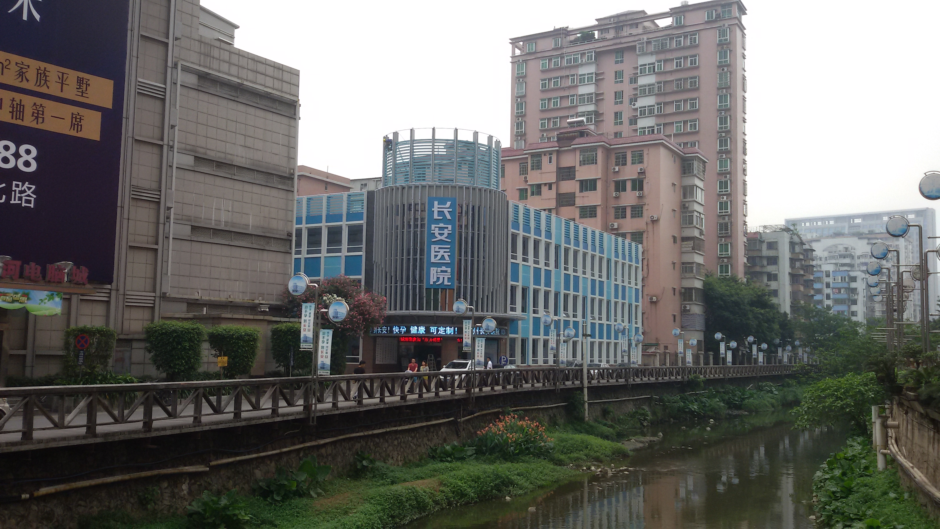 粵語: 廣州長安醫院